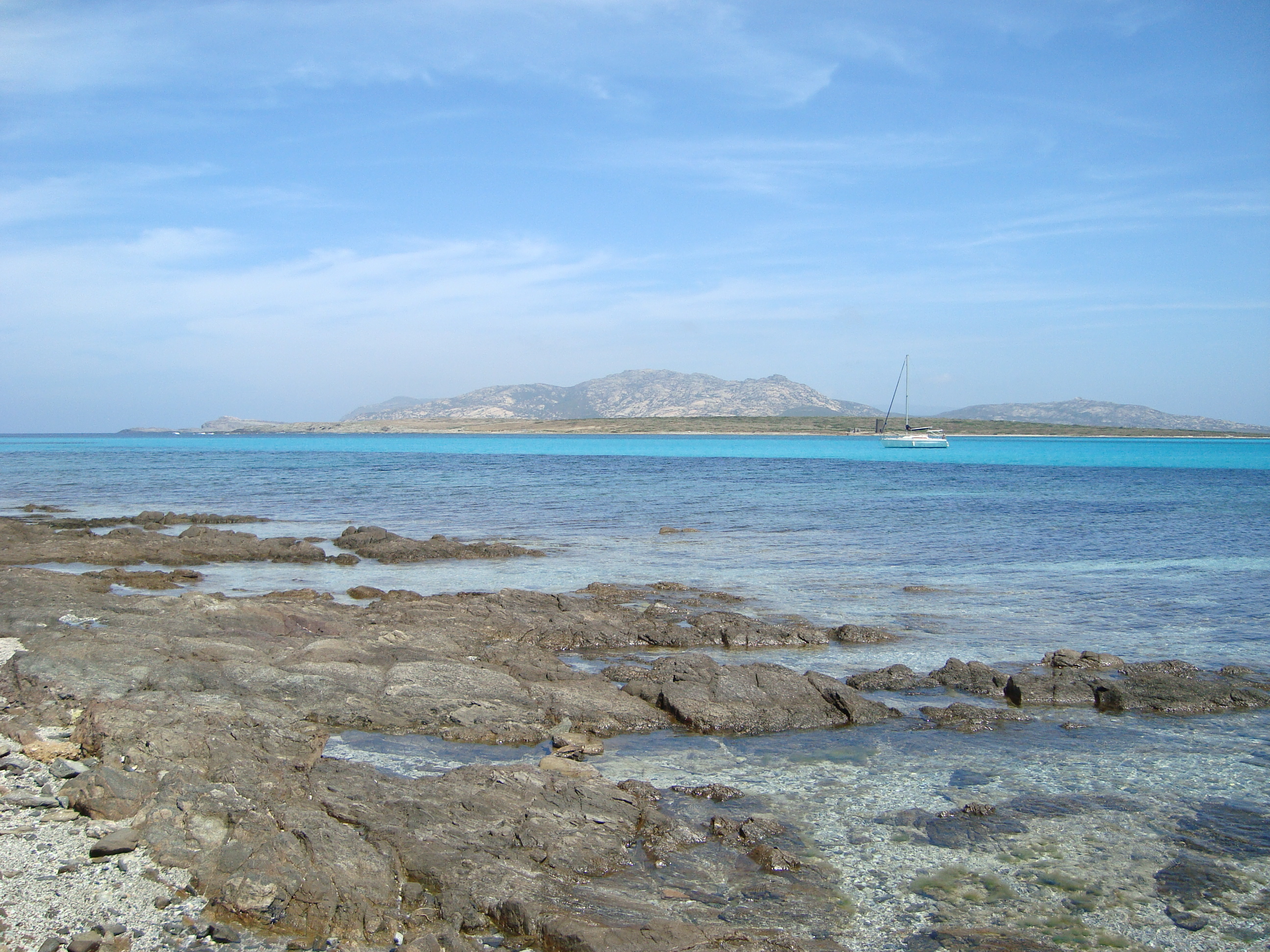 Stintino